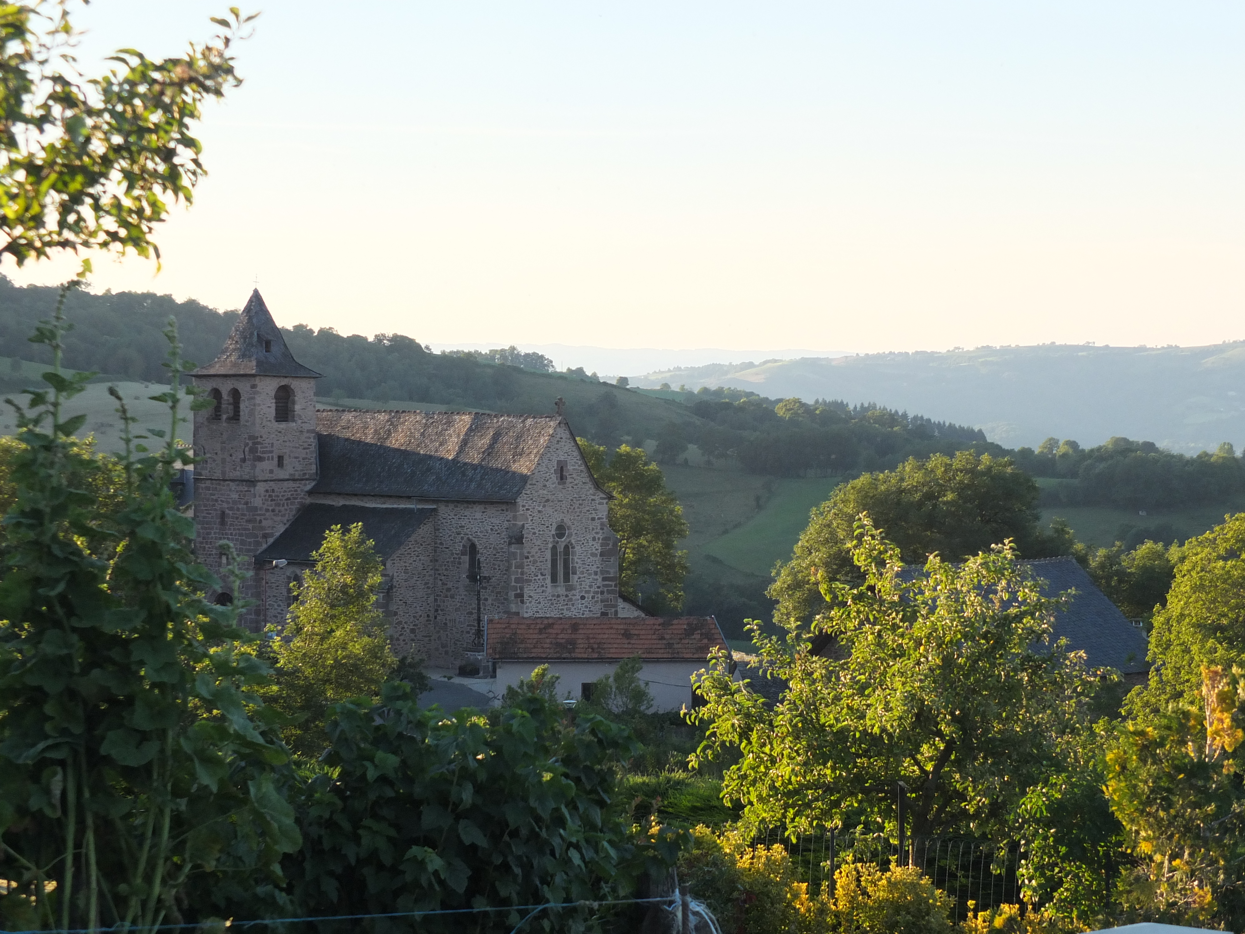 Église d'Escandolières dans le département de l'Aveyron (12), France